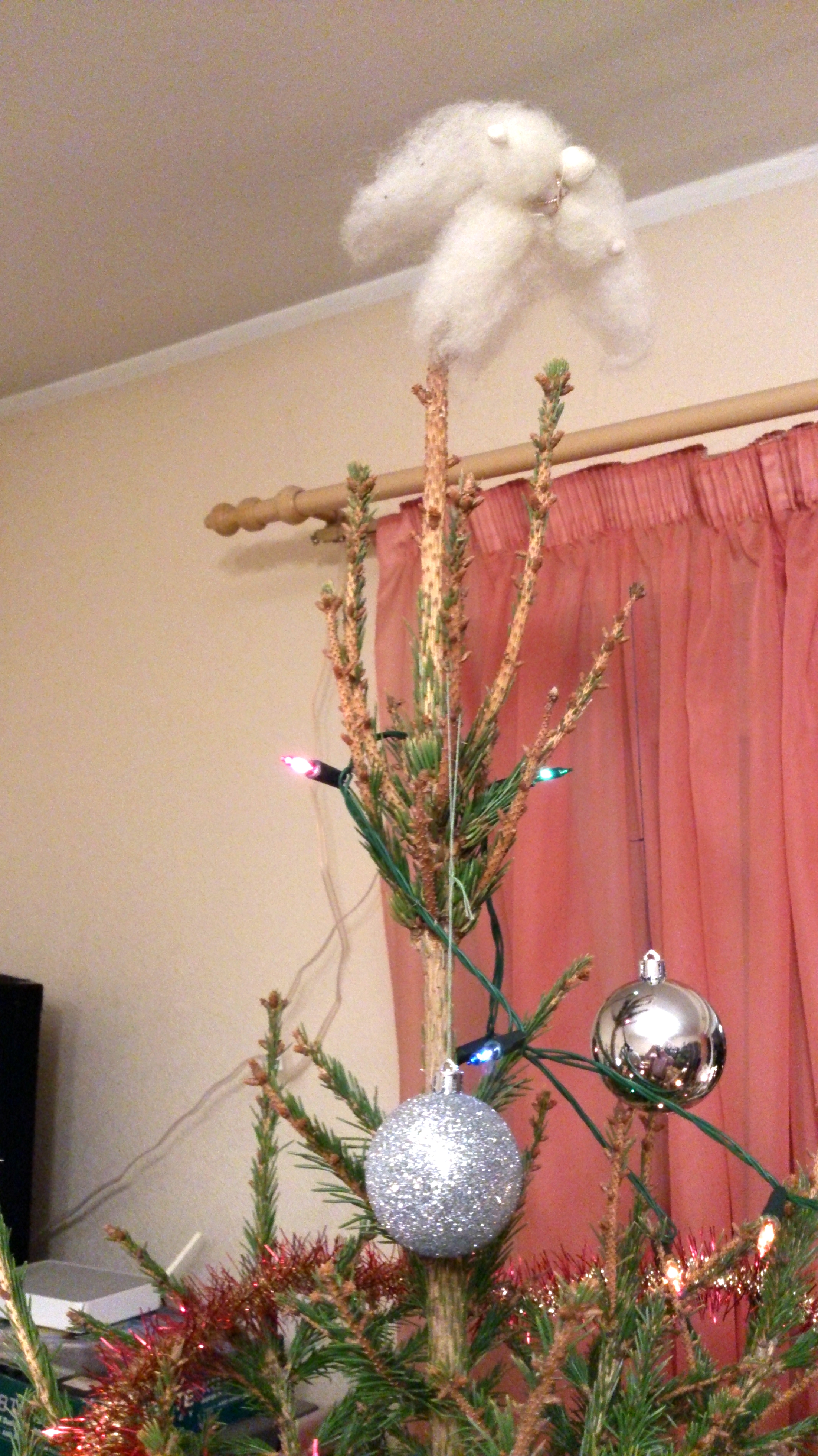 Ingel on üks tüüpilisi Eesti jõulehteid, mis asetatakse kuuse tippu